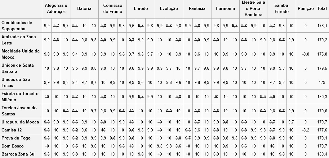 Resultados do Carnaval de São Paulo - 2015 - 1 UESP